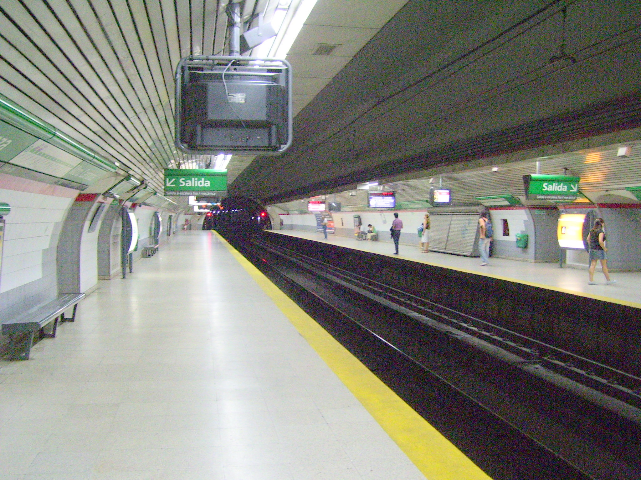 Estación Ministro Carranza. Buenos Aires, Argentina